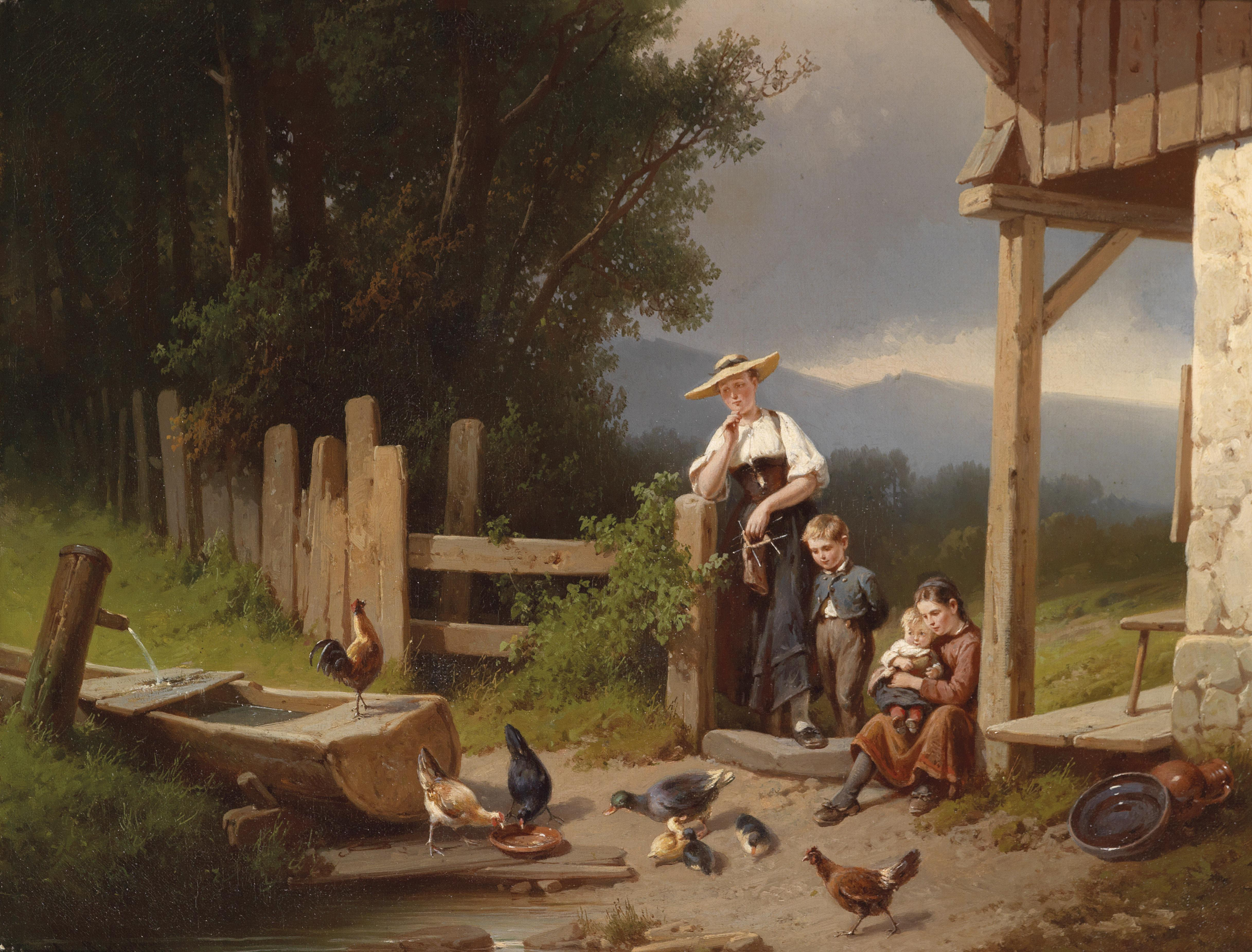 "Gemütlich ist Beisammensein", rückseitig alt betitelt und bezeichnet, signiert A. von Rentzell, Öl auf Leinwand, 49 x 62 cm